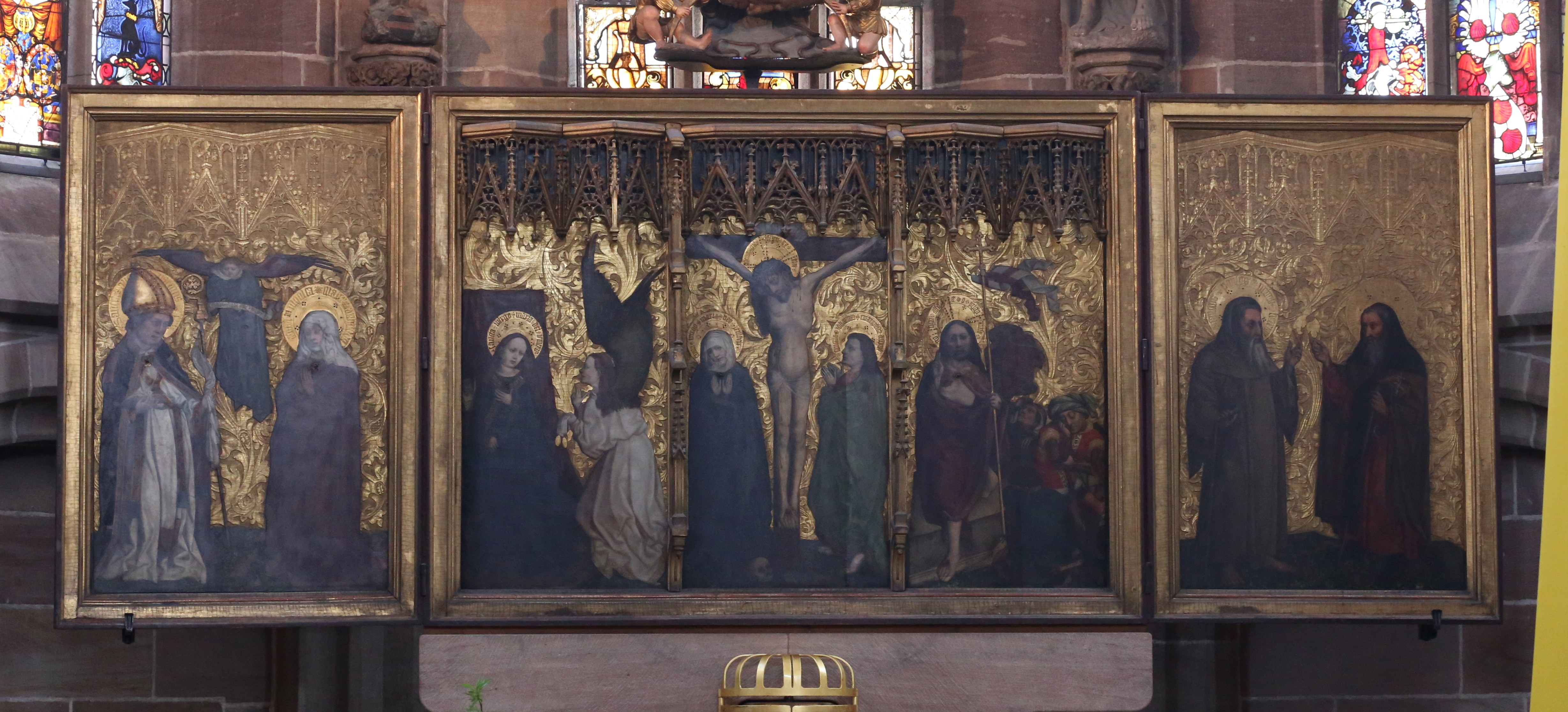 Frauenkirche, Nürnberg